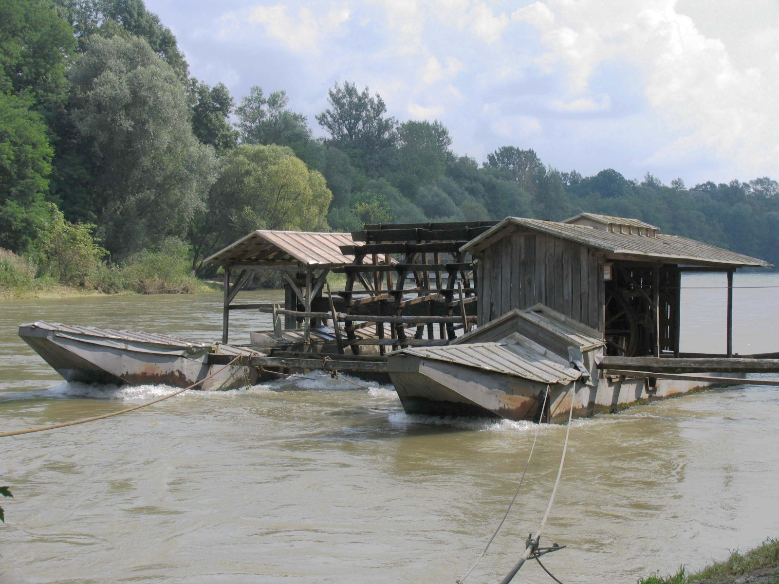 Schiffsmühle auf der Mur Nähe Verzej, Slowenien